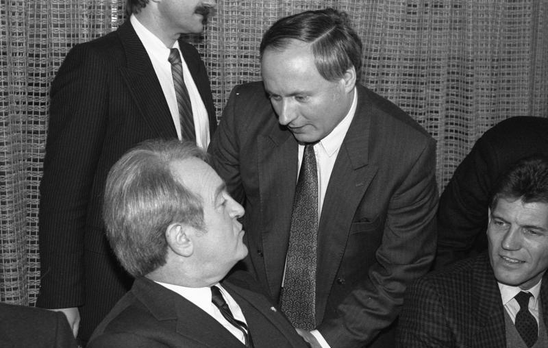 18.12.1986 Beratung der Ministerpräsidenten der Länder über einen Medien-Staatsvertrag in der Landesvertretung Hessen